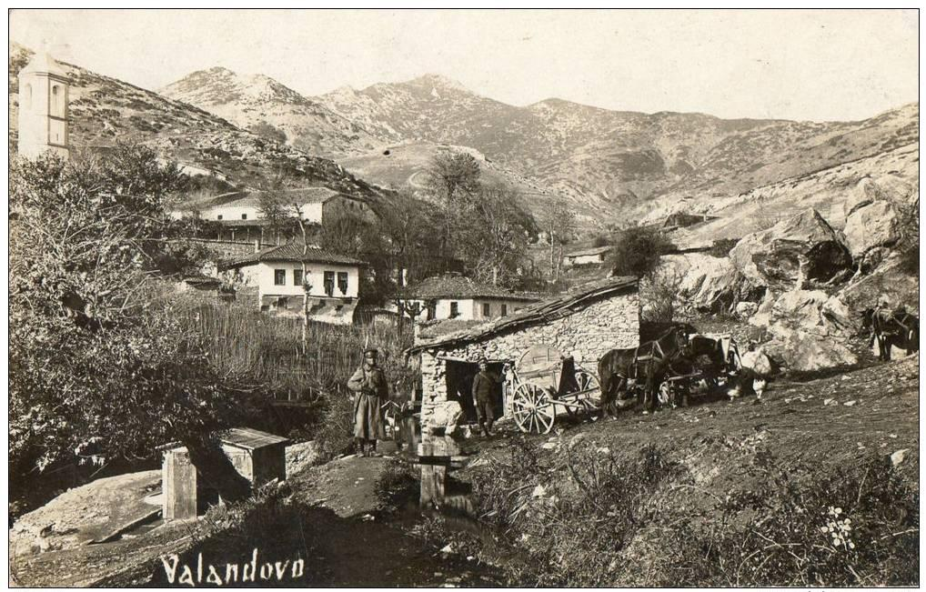 Български войници във Валандово през Първата световна война